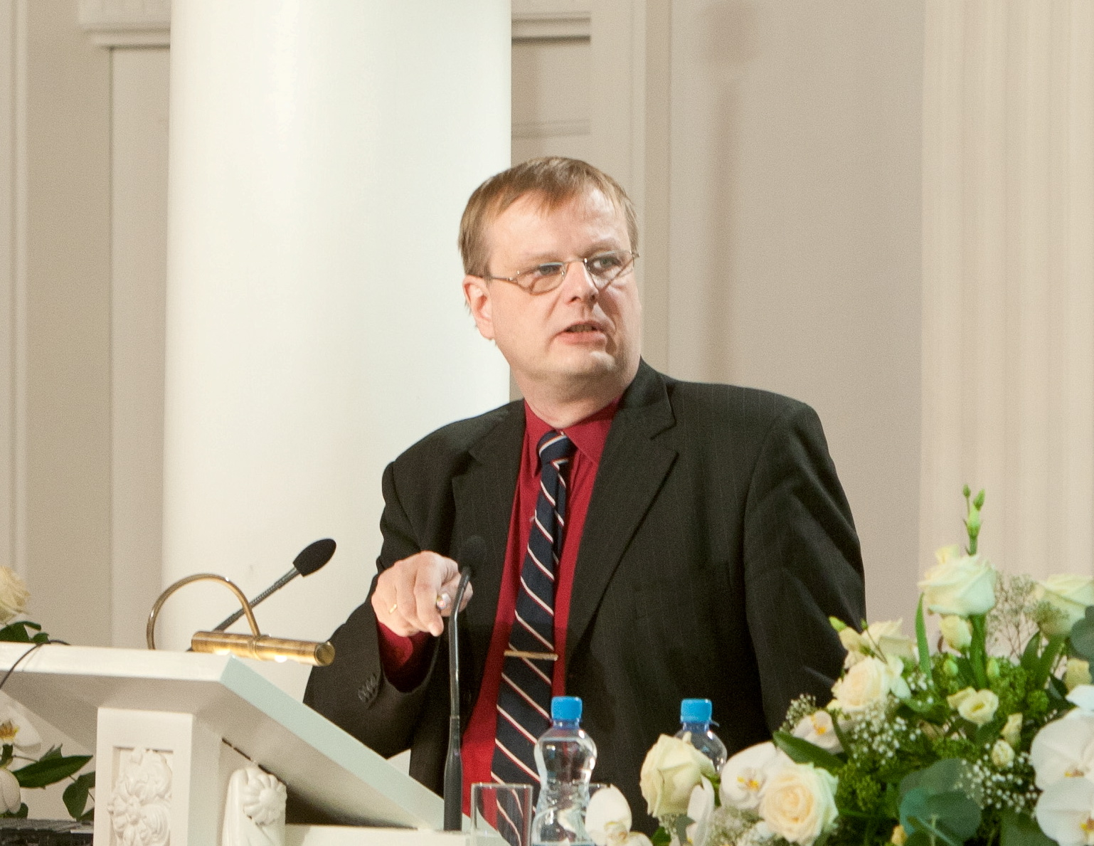 L. Puusepa nimelise Neuroloogide ja Neurokirurgide Seltsi talvesseminar Tartu Ülikooli aulas 3. detsembril 2010. Tartu Ülikooli kultuuriteaduste ja kunstide instituudi prof Jaan Ross esinemas ettekandega.